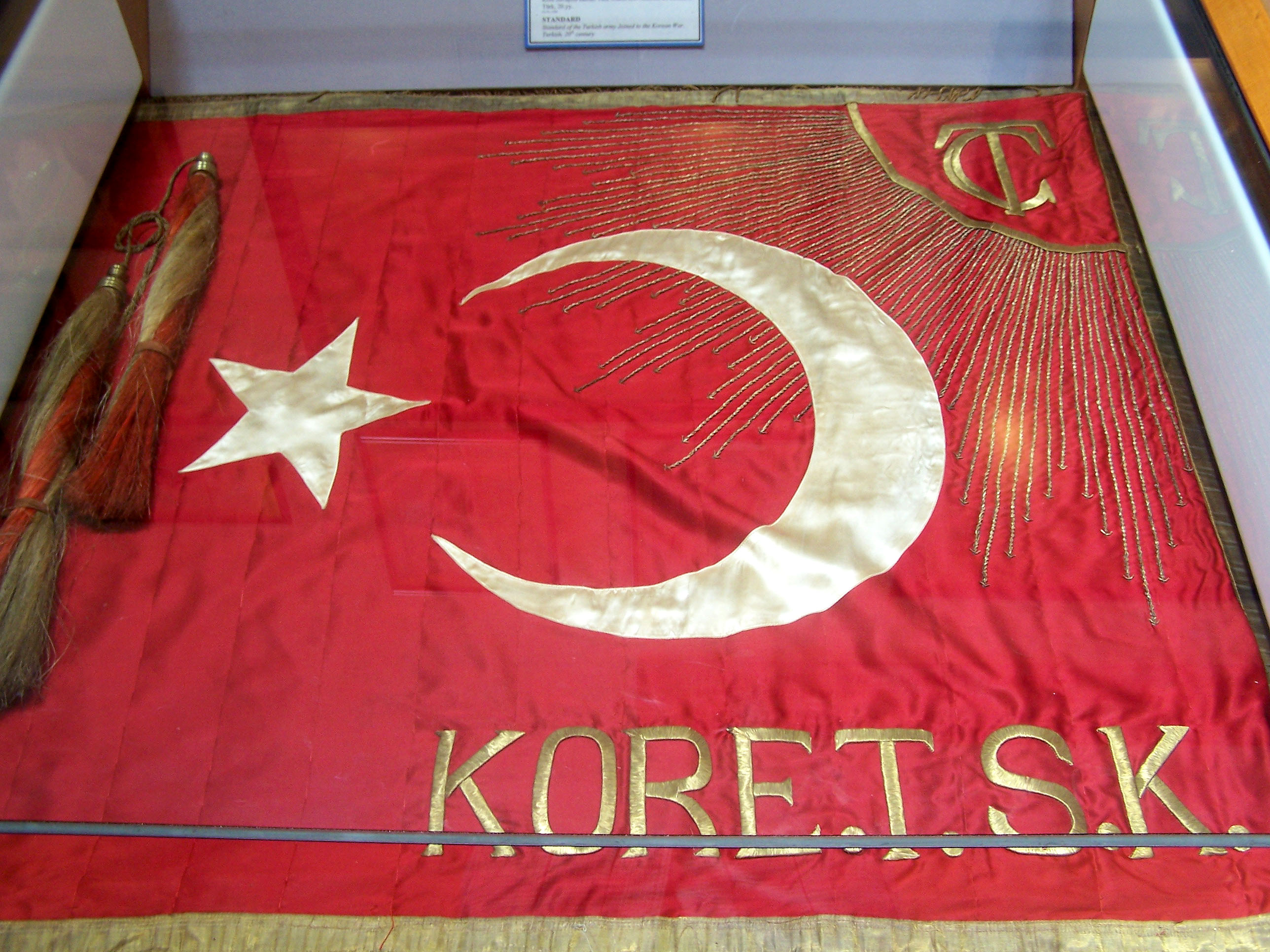 Standard of Turkish Armed Forces in the Korean War in İstanbul Askeri Müzesi (Military Museum) in Şişli, İstanbul, Turkey